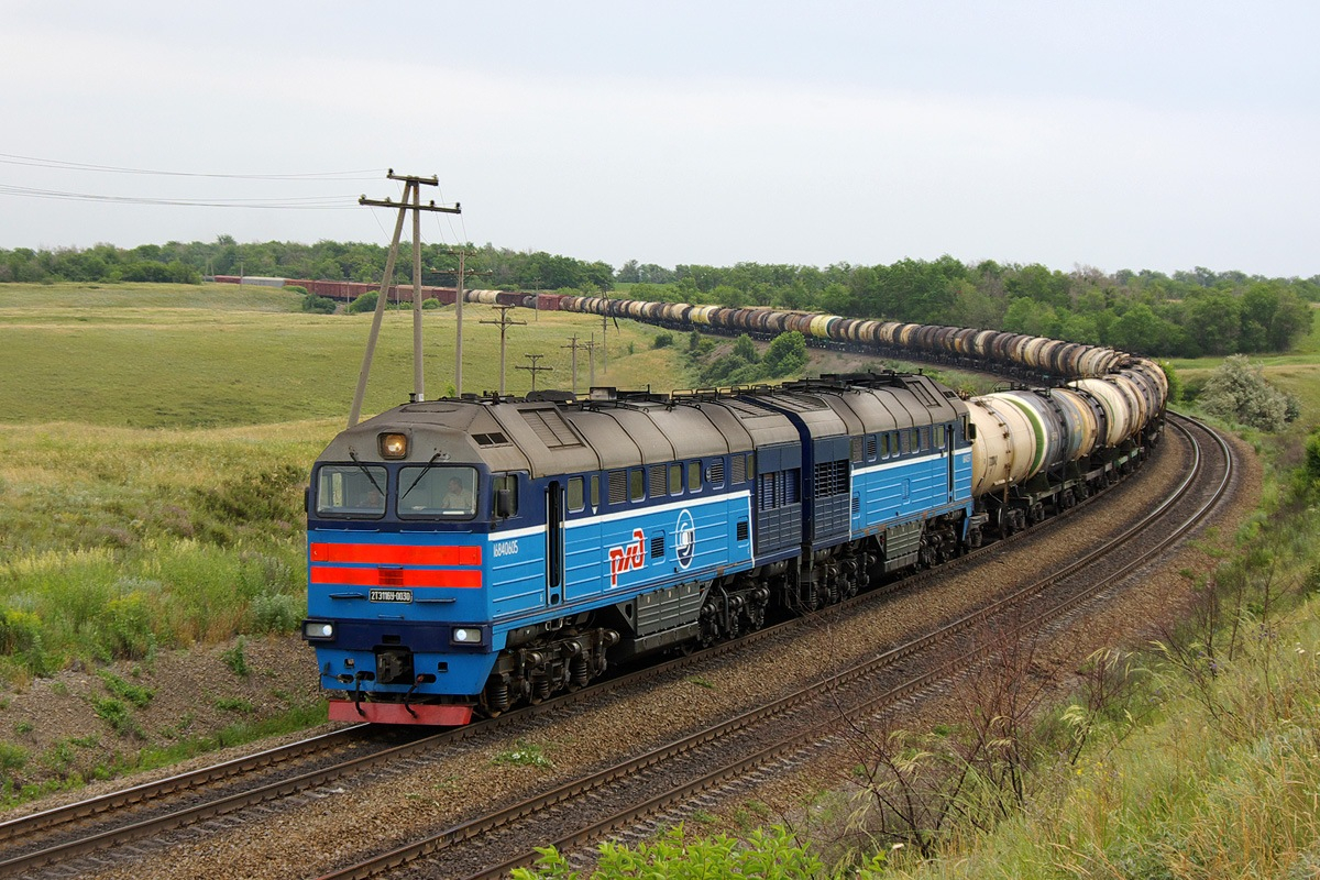 Тепловоз 2ТЭ116У-0030 с поездом около Белой Калитвы